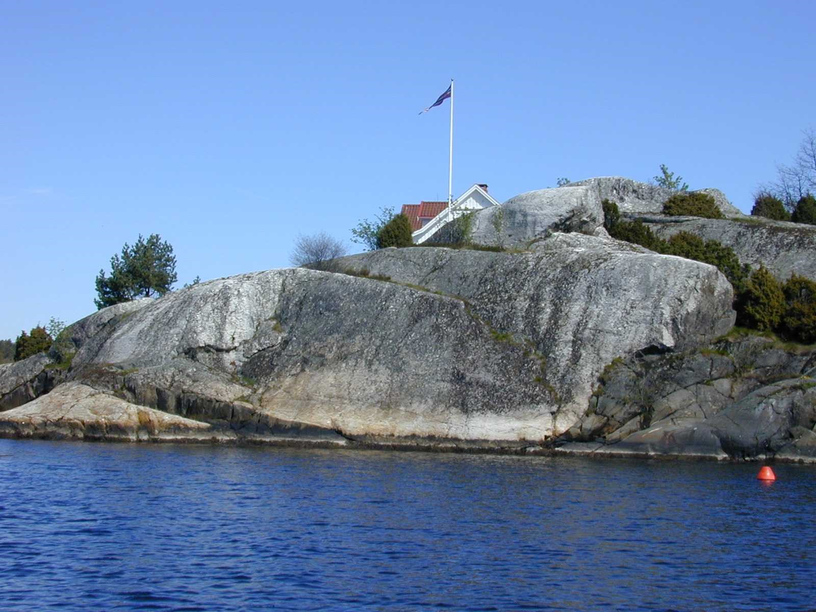 Bråtane naturminne sett sørfra